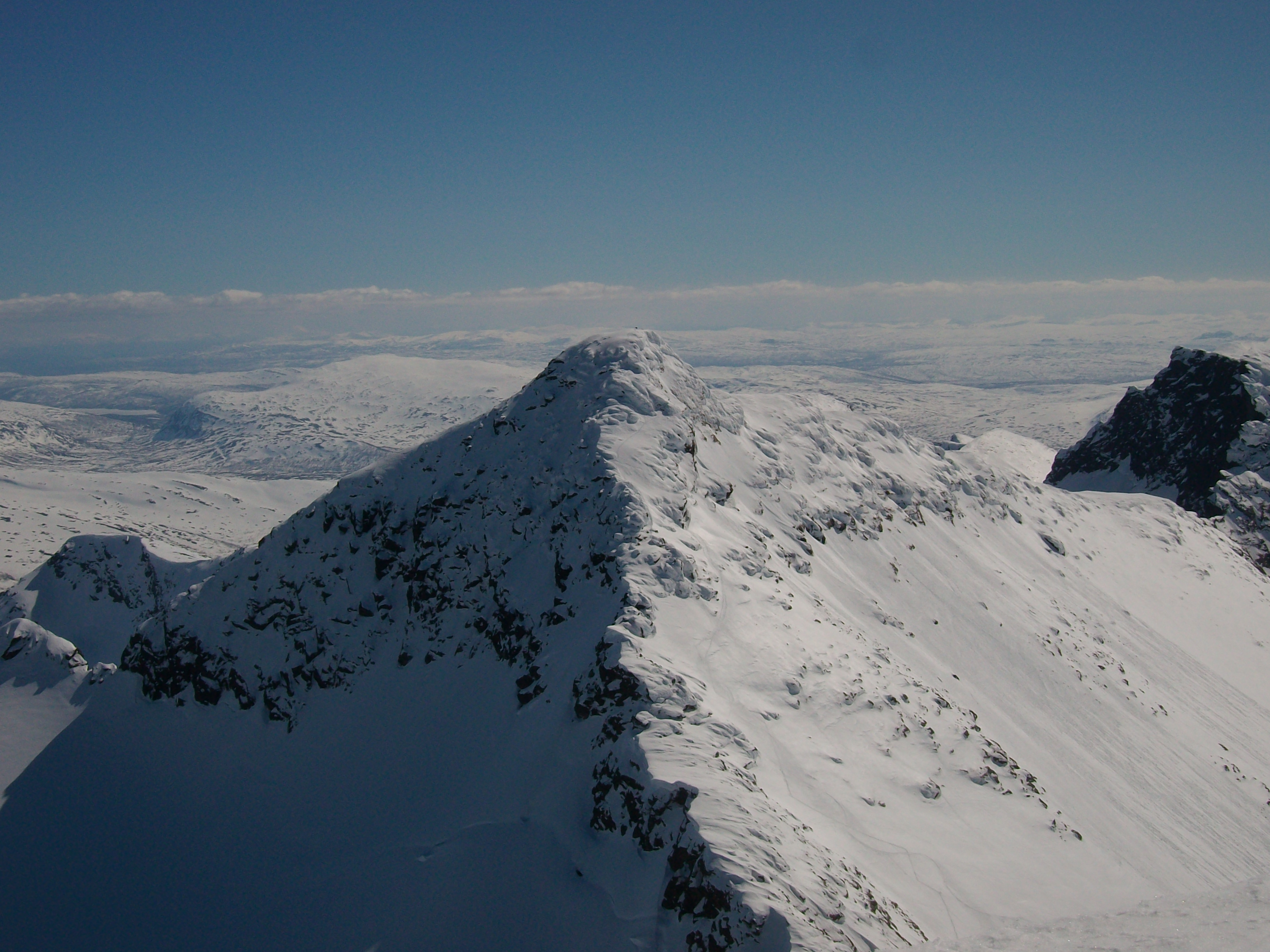 Okshornet sett fra Oksskolten.